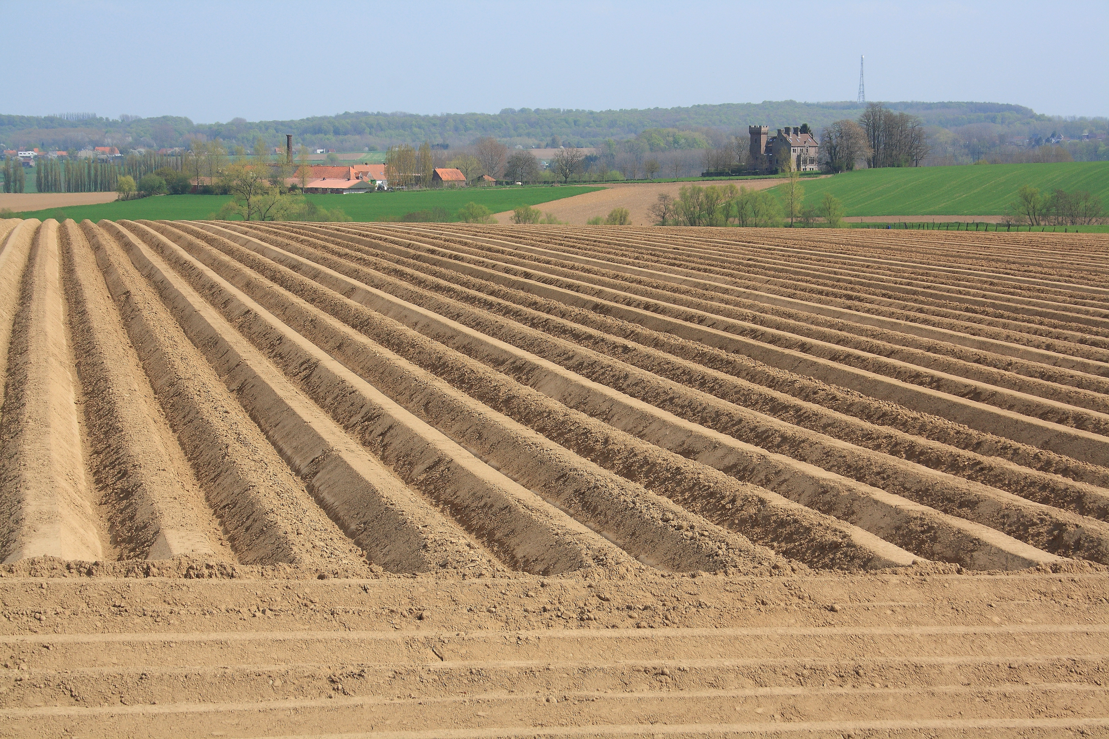 Hof te Wolfskerke, Opbrakel, Brakel, Vlaanderen, België